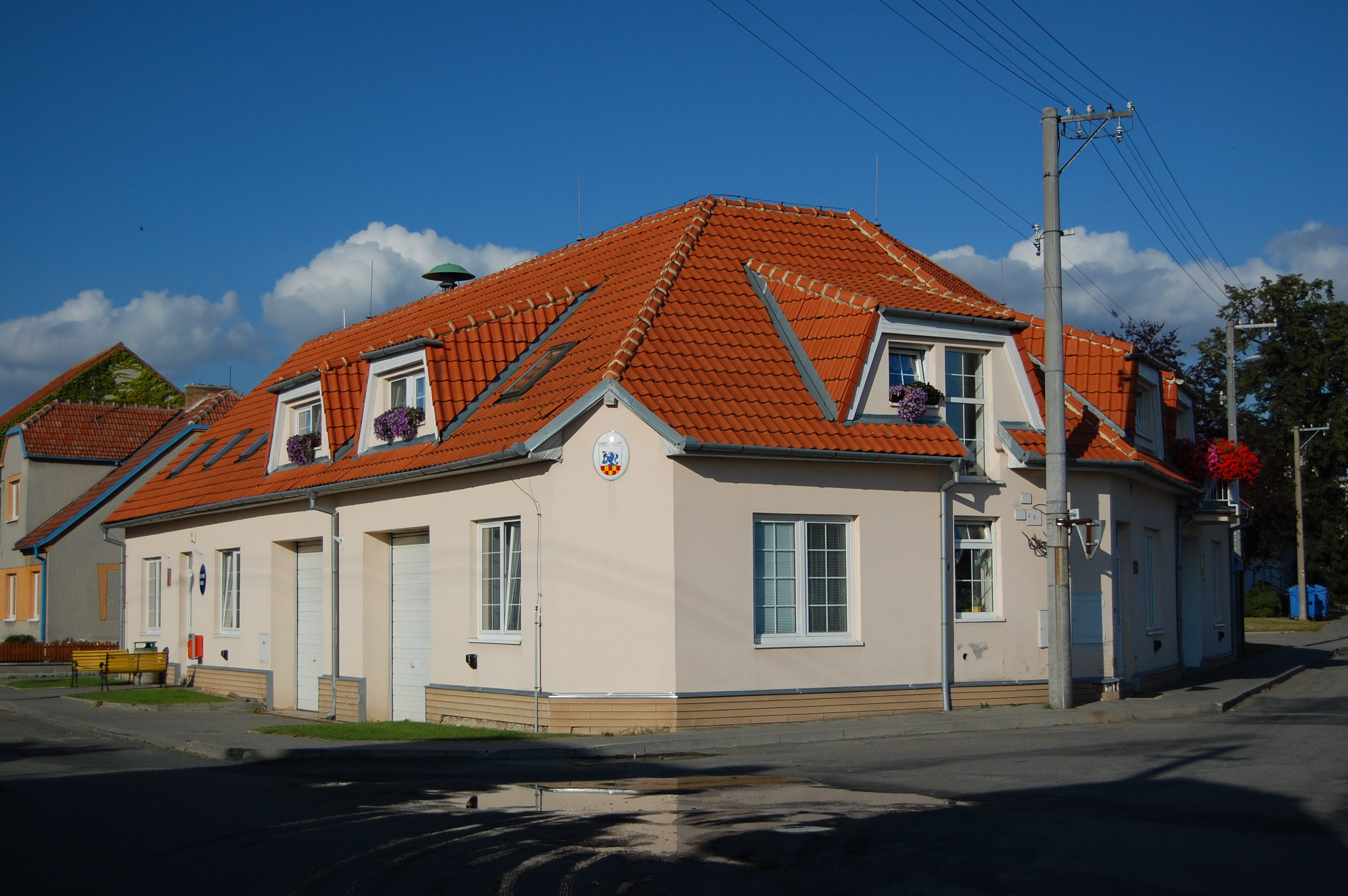 Obecní úřad, Suchý, okres Blansko